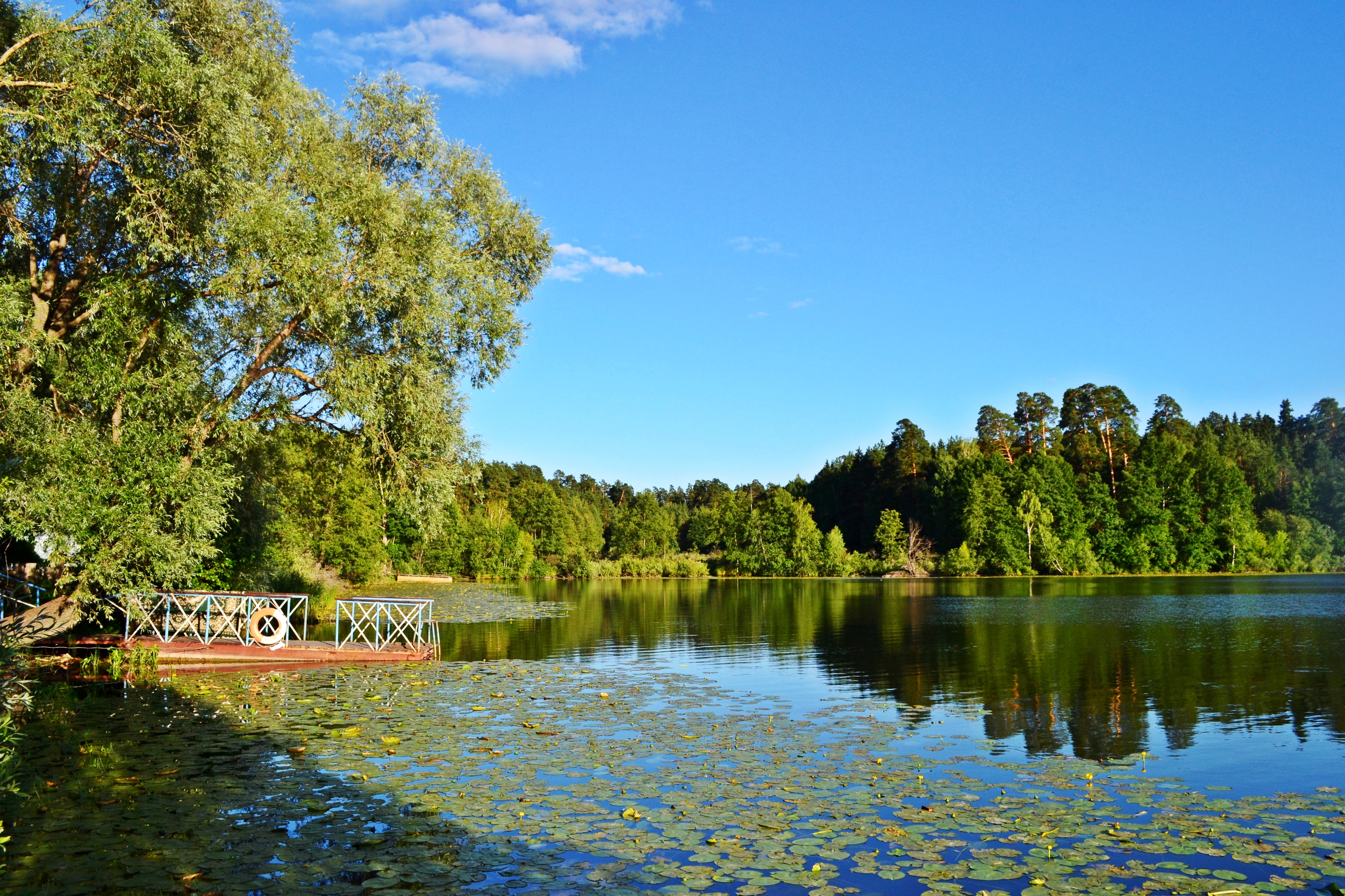 Раифское озеро около одноименного монастыря